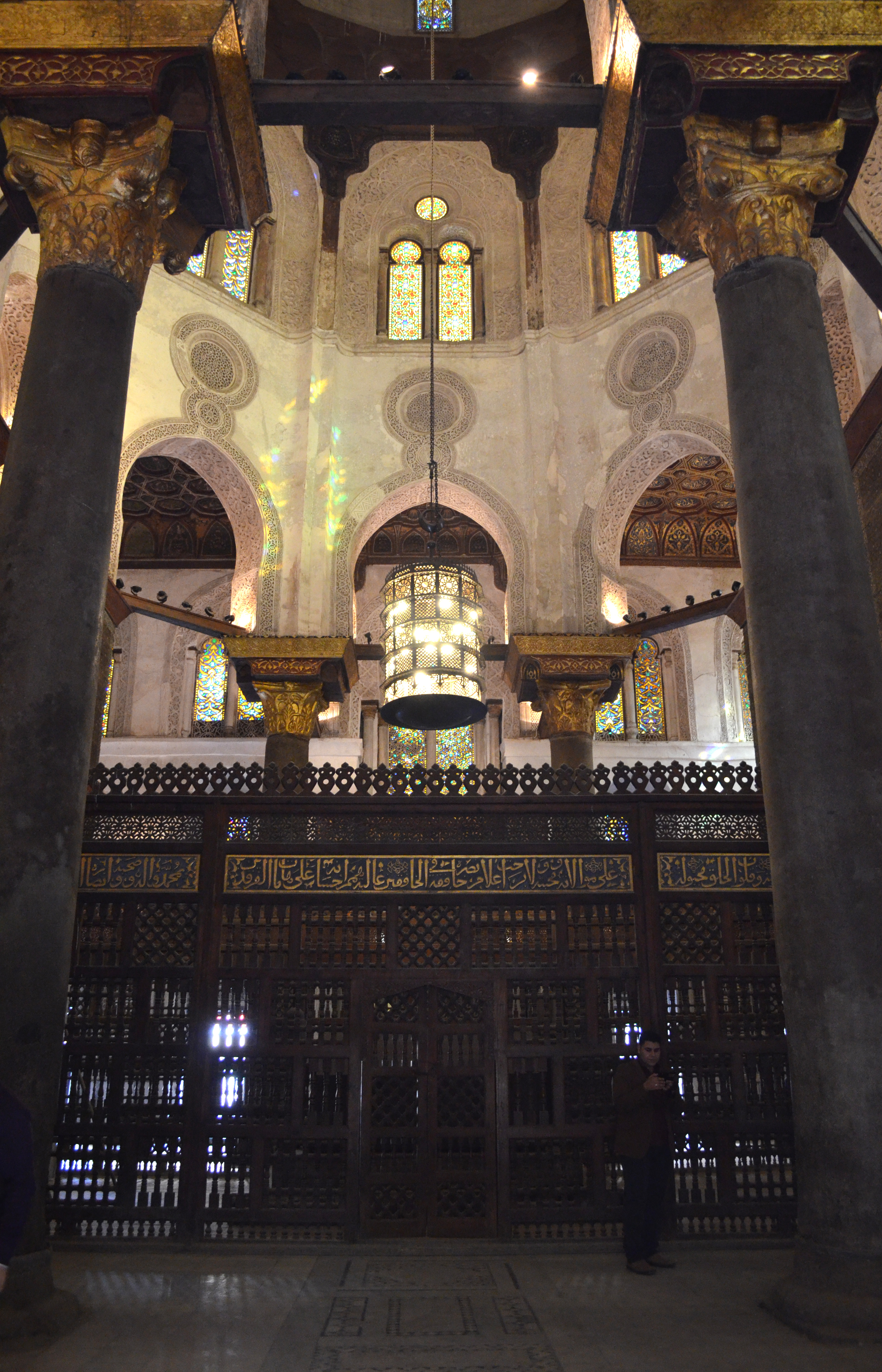 مشهد لقبة السلطان قلاوون من الداخل والتي تقع بشارع المعز لدين الله